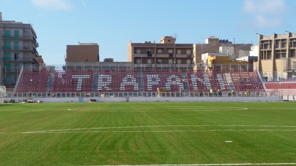 nuova curva supporters locali stadio provinciale di trapani